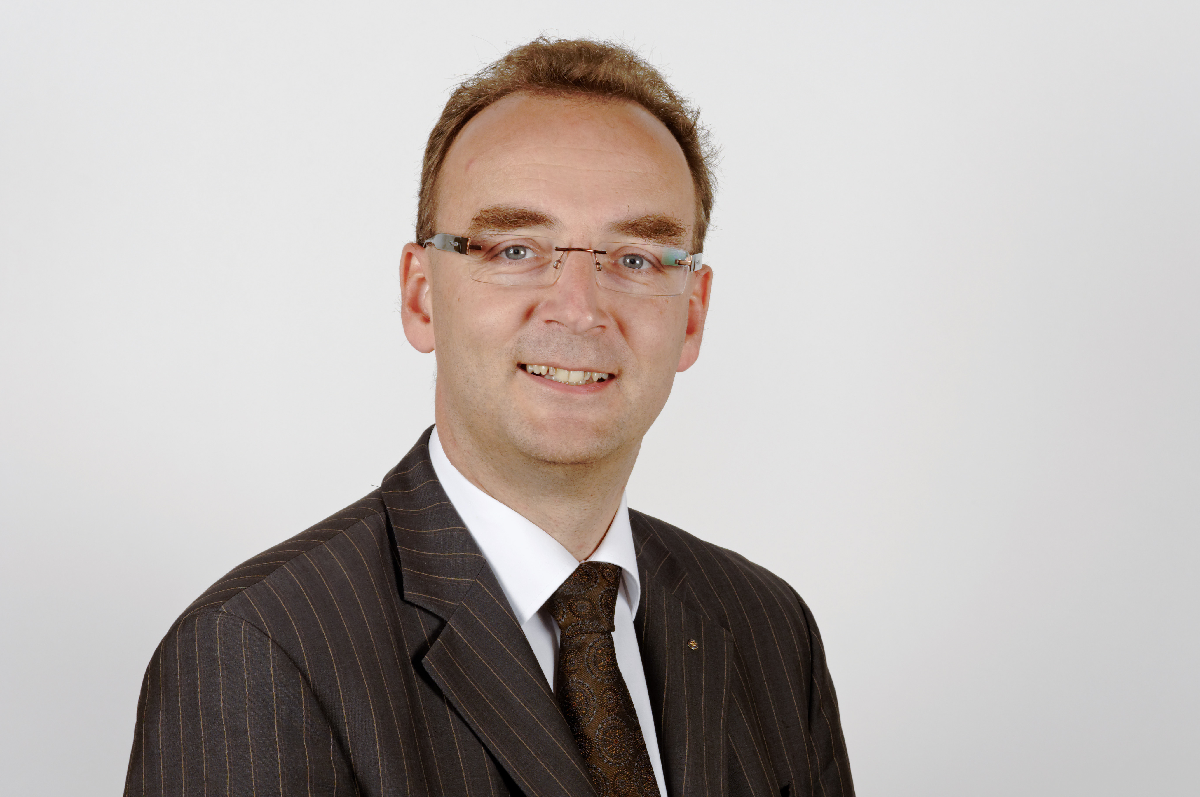 Landtagsprojekt Bayern